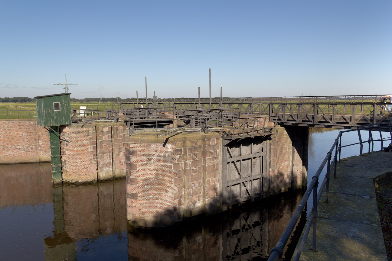 Aufnahme der zwischen 1890 und 1892 an der Geeste gebauten Schiffdorfer Stauschleuse